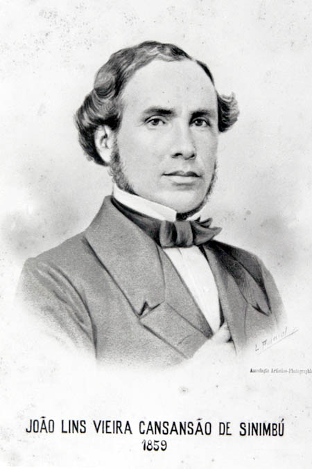 João Lins Vieira Cansansão, o Visconde de Sinimbu.